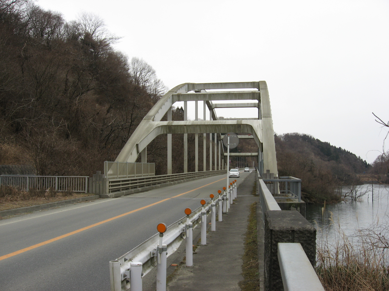 宮ヶ瀬湖にかかる七曲橋